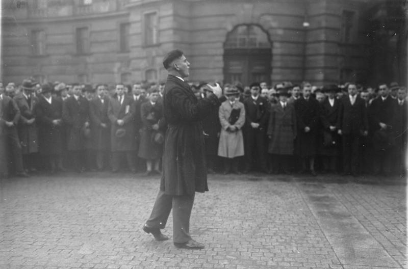 Eine machtvolle Kundgebung der deutschen Studentenschaft gegen die Schandtaten Polens vor der Universität in Berlin ! Der Sprecher der Studenten schildert in einer markanten Rede die Leiden der deutschen Brüder im Osten.